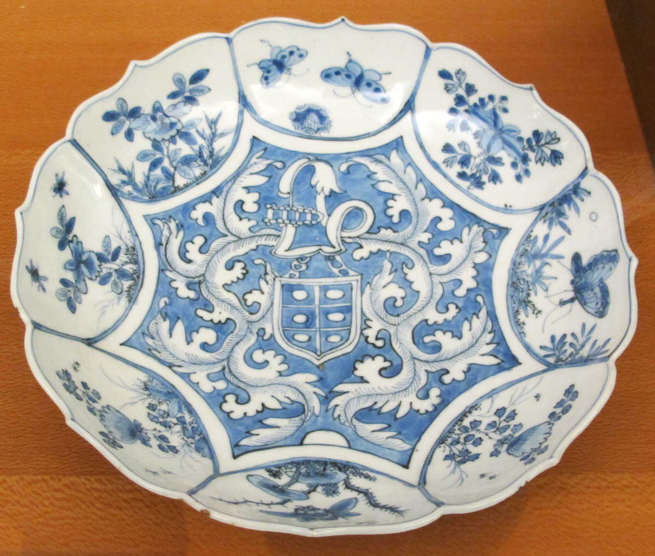 Dinastia ming, piatto con fiori, frutta, farfalle e erme di mello o d'almeria, 1580-1600 ca.